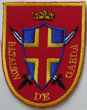 баталион охраны молдова